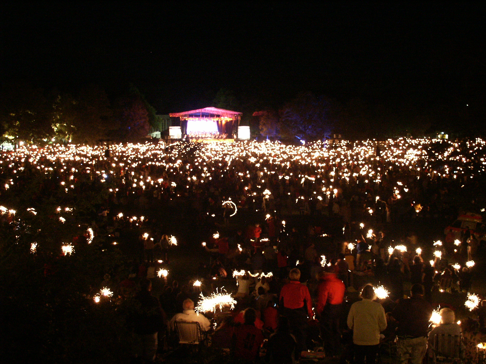 Klassik Open Air 2005 in Nuremberg - final waving of sparklers / Klassik Open Air 2005 in Nürnberg - abschließendes Wunderkerzenschwenken